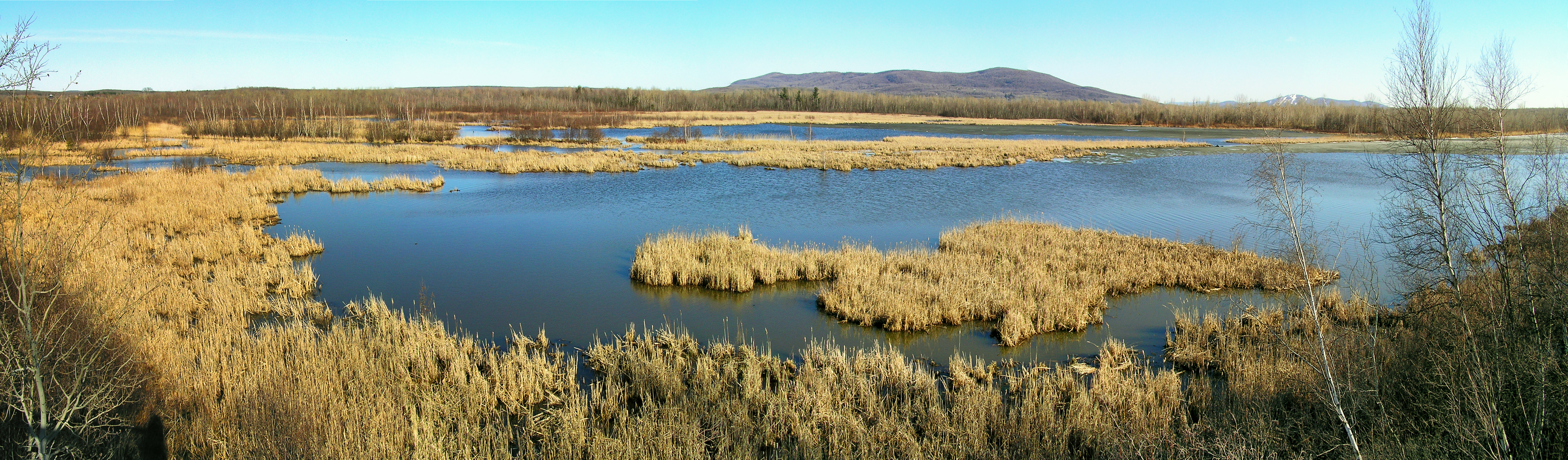 Granby, Montérégie (Québec) - Panorama du lac Boivin. En arrière-plan, le mont Shefford